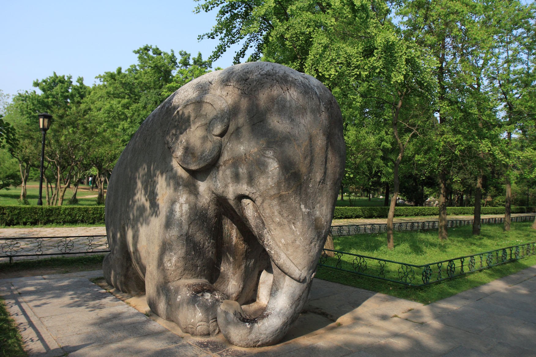 Ming Xiaoling Mausoleum; 明孝陵 at Nanjing